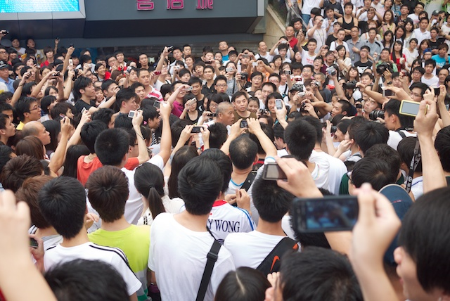 齐撑粤语大行动